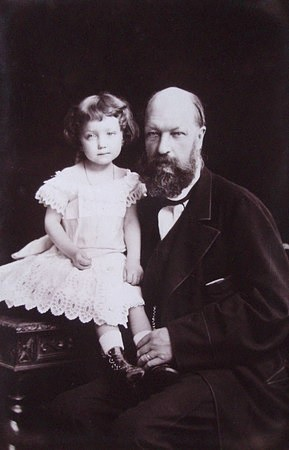 Aleksander Branicki z wnuczką Marią